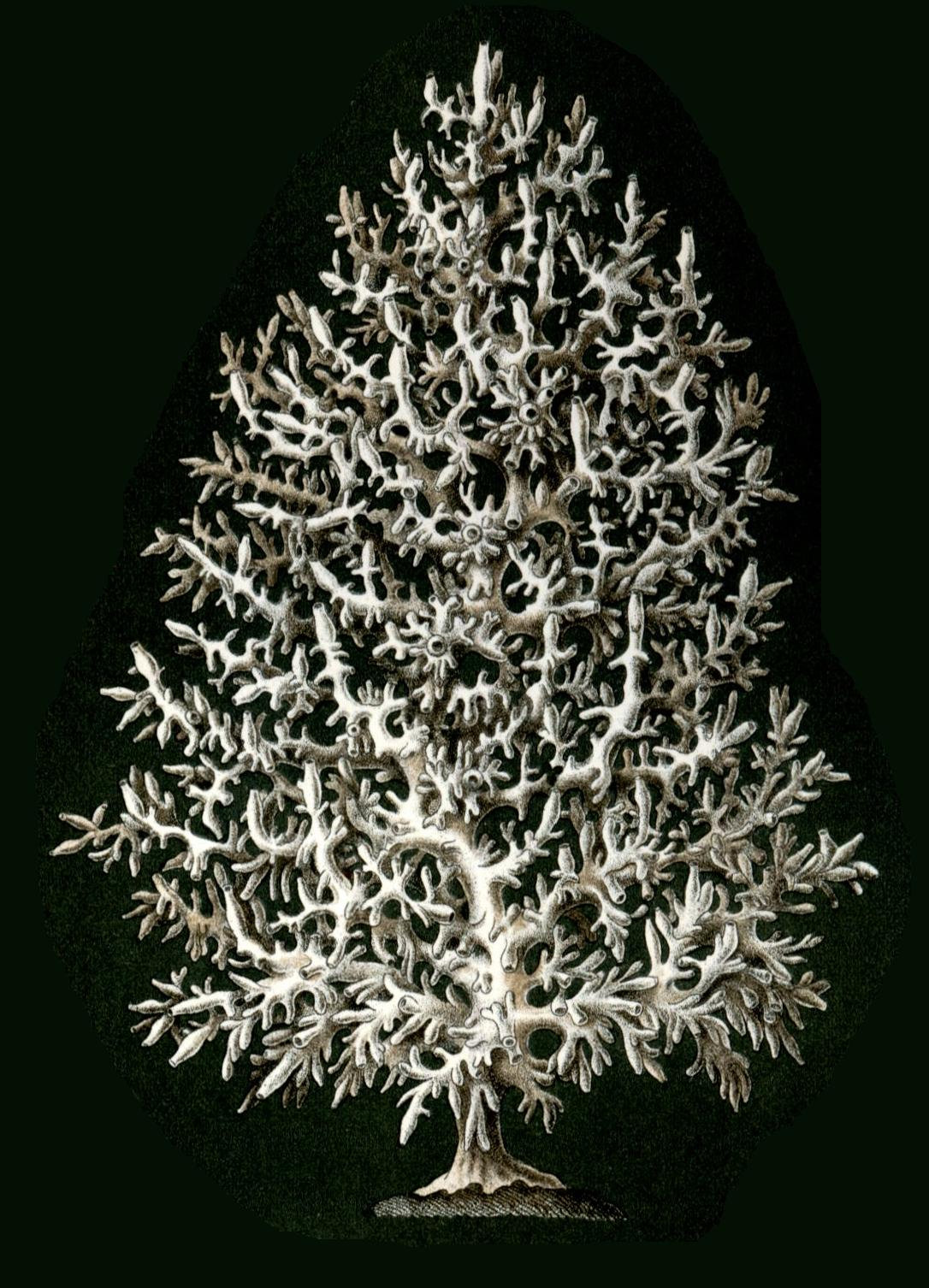 Ascandra pinus (Haeckel) = Leucosolenia complicata (Montagu, 1818), habitus